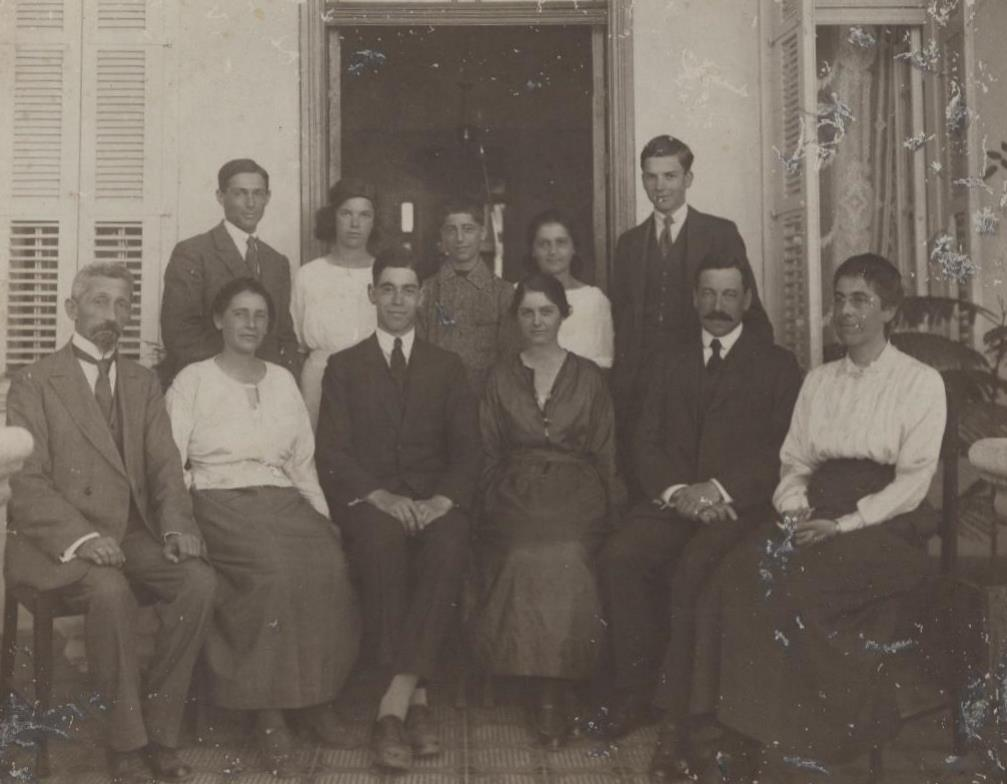 הדסה עם הנציב העליון הרברט סמואל, אדווין ובני המשפחה